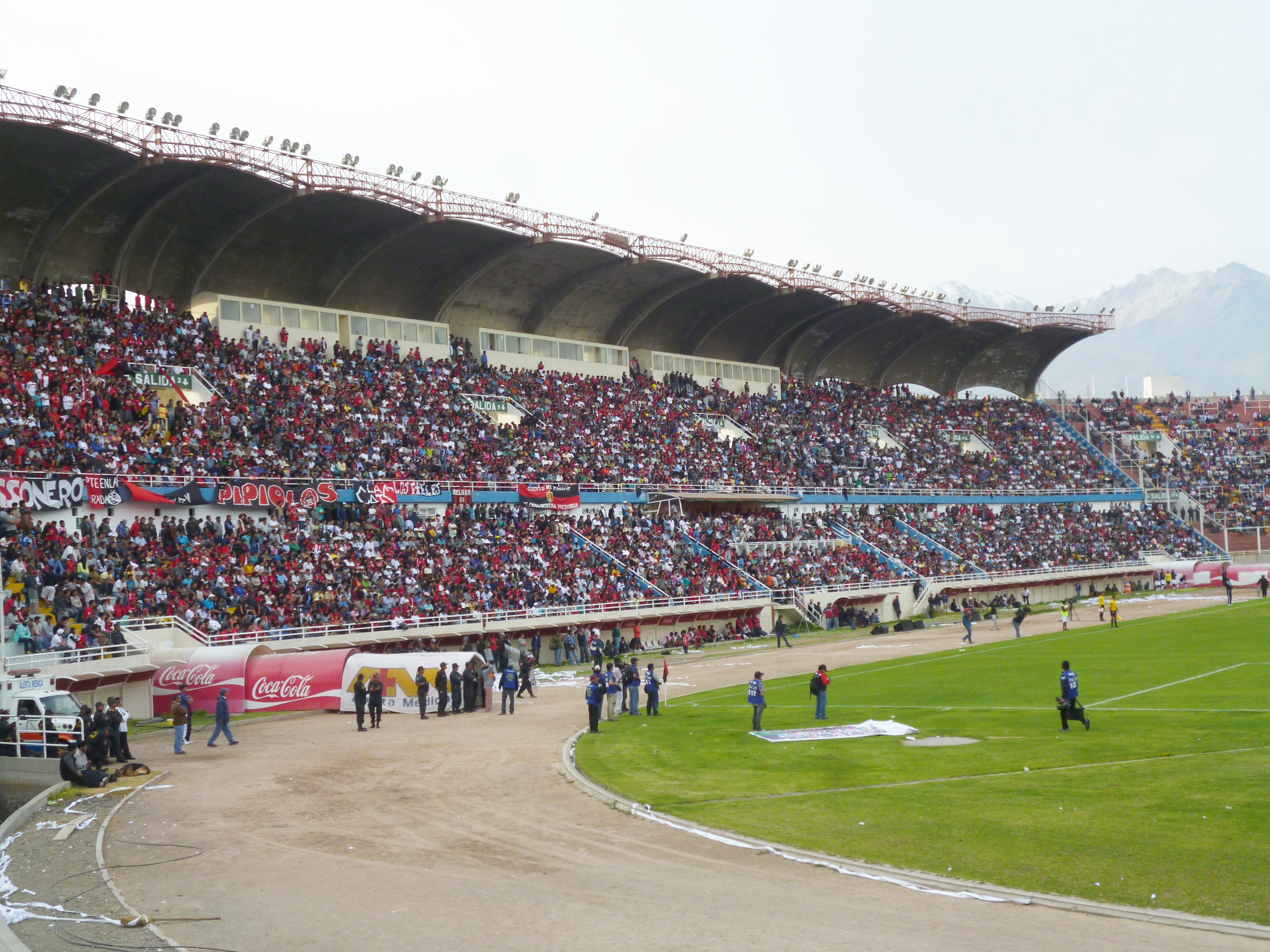 Tribuna Occidente del Estadio Monumental Virgen de Chapi